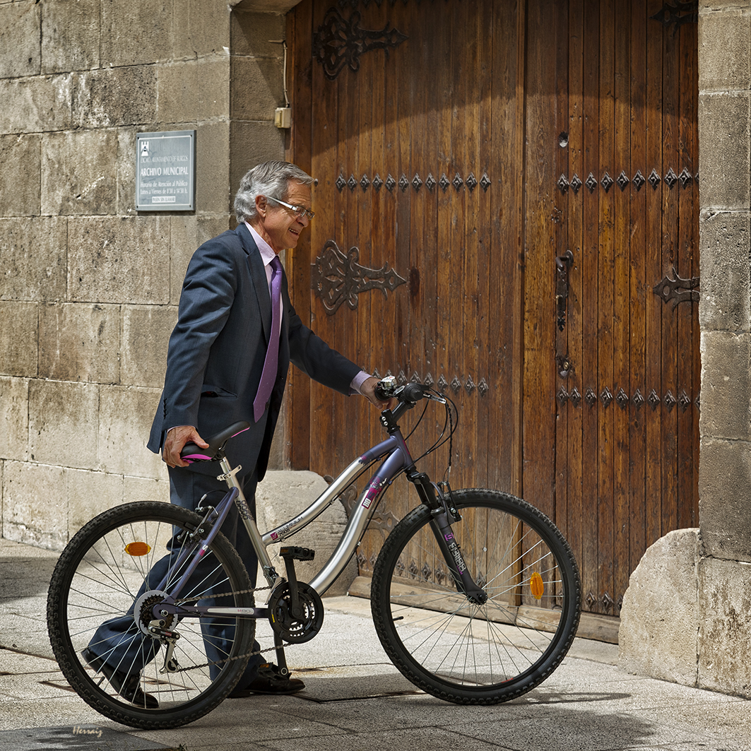 Luis Escribano llegando al Palacio de Castilfalé para oficiar una boda.